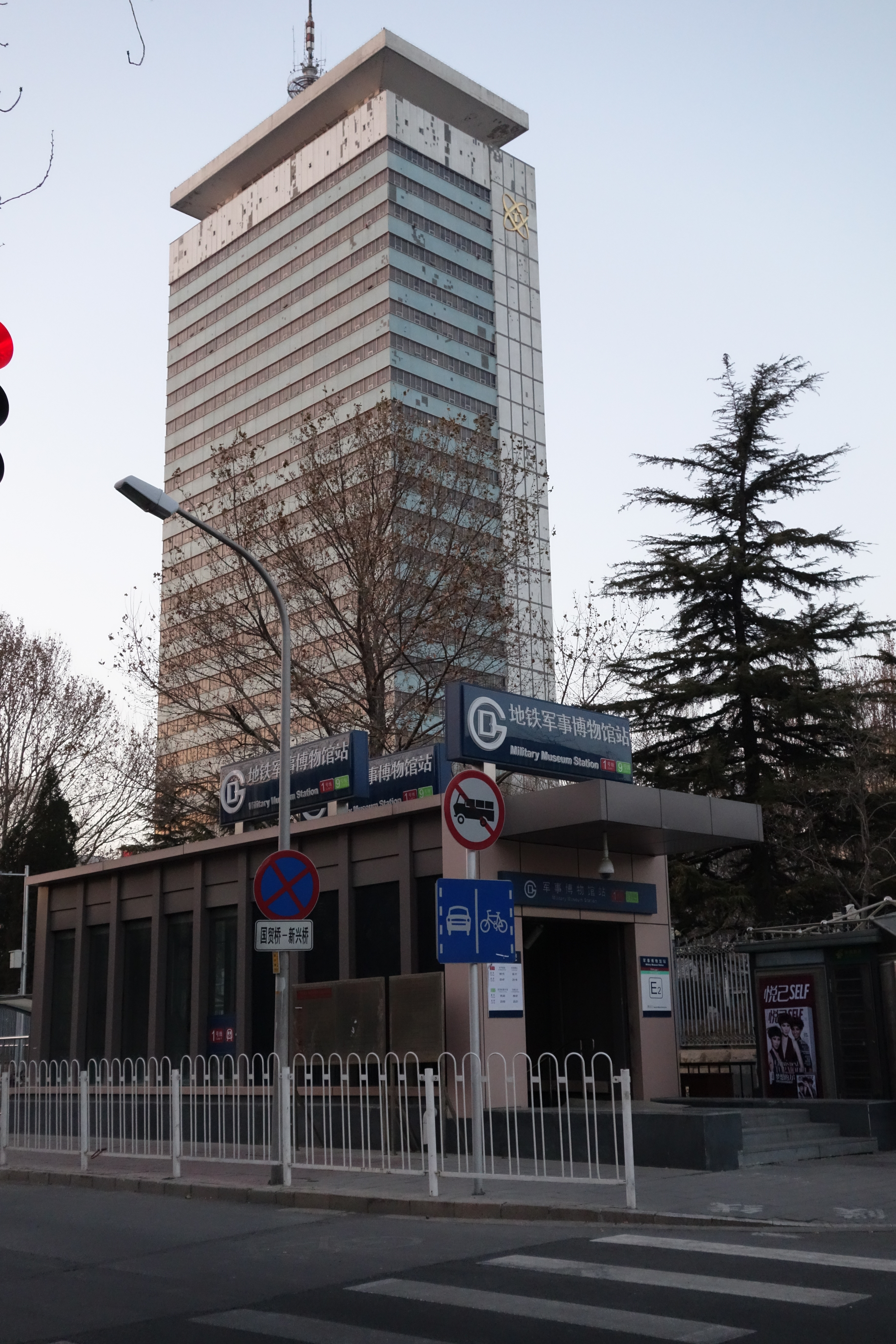 军博站E2口和彩色电视中心